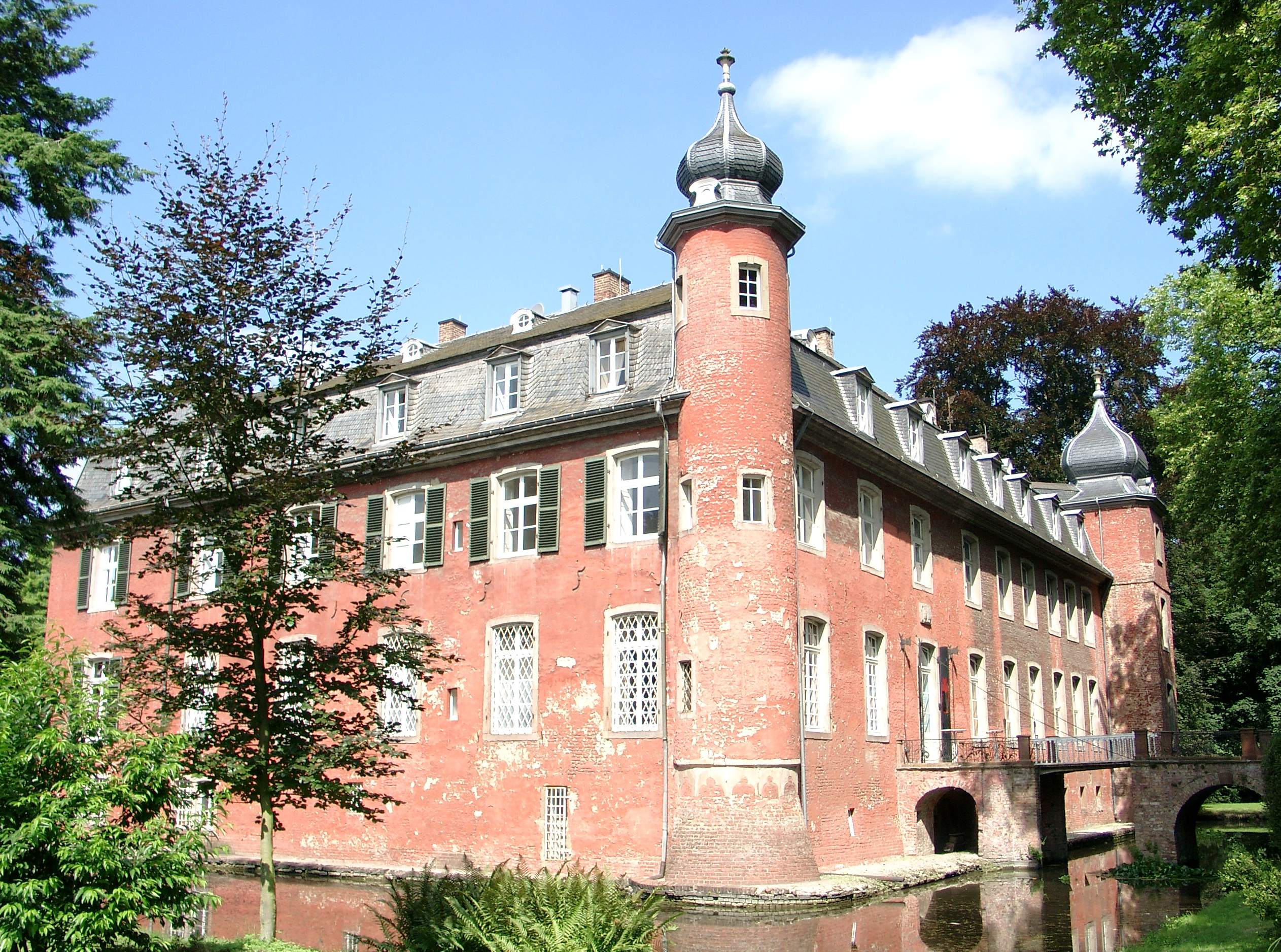 Schloss Gymnich in Erftstadt, an der Erft im Rheinischen Braunkohlerevier am Rande der Ville / Köln / Deutschland.